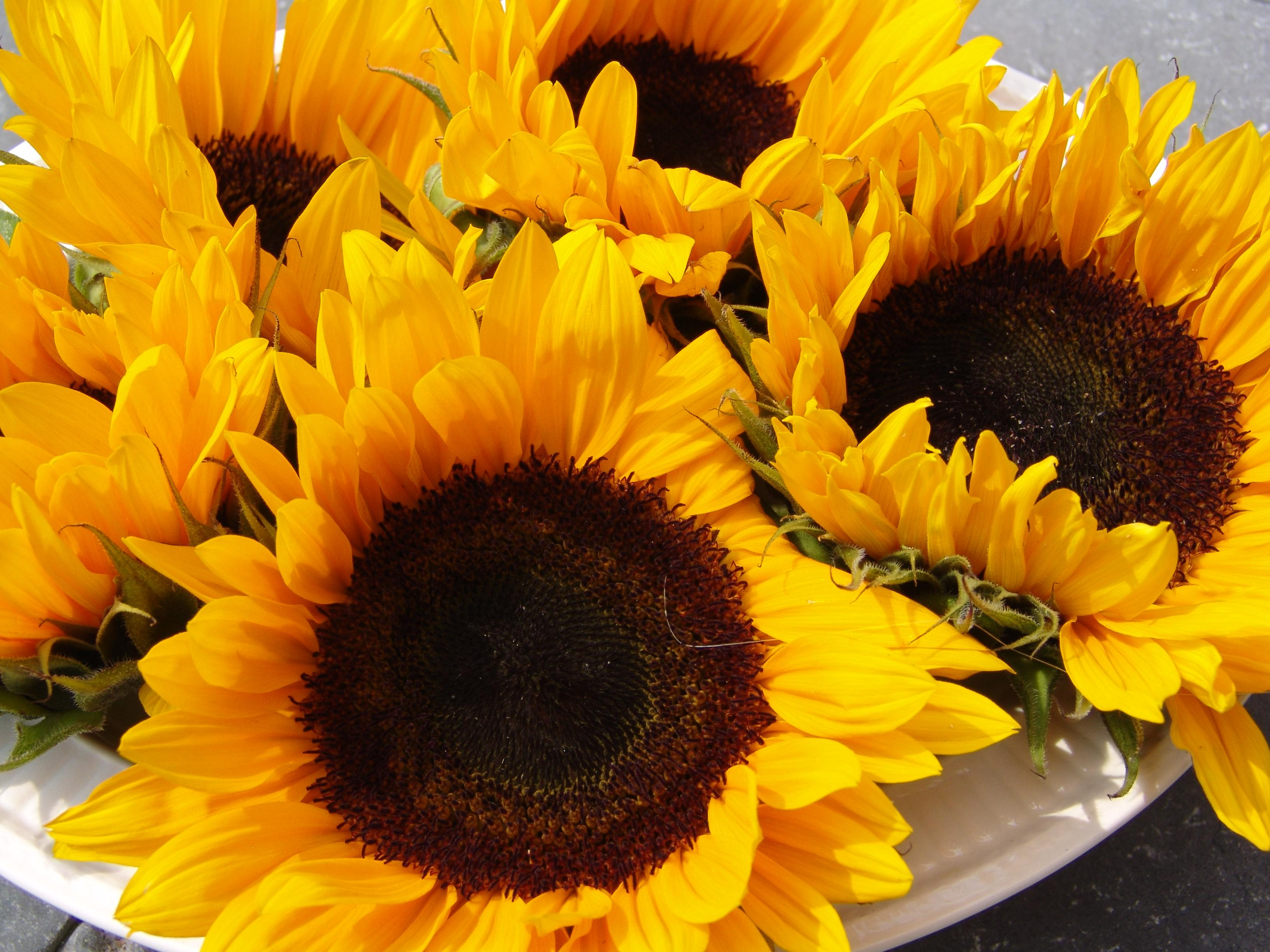 Some sunflowers